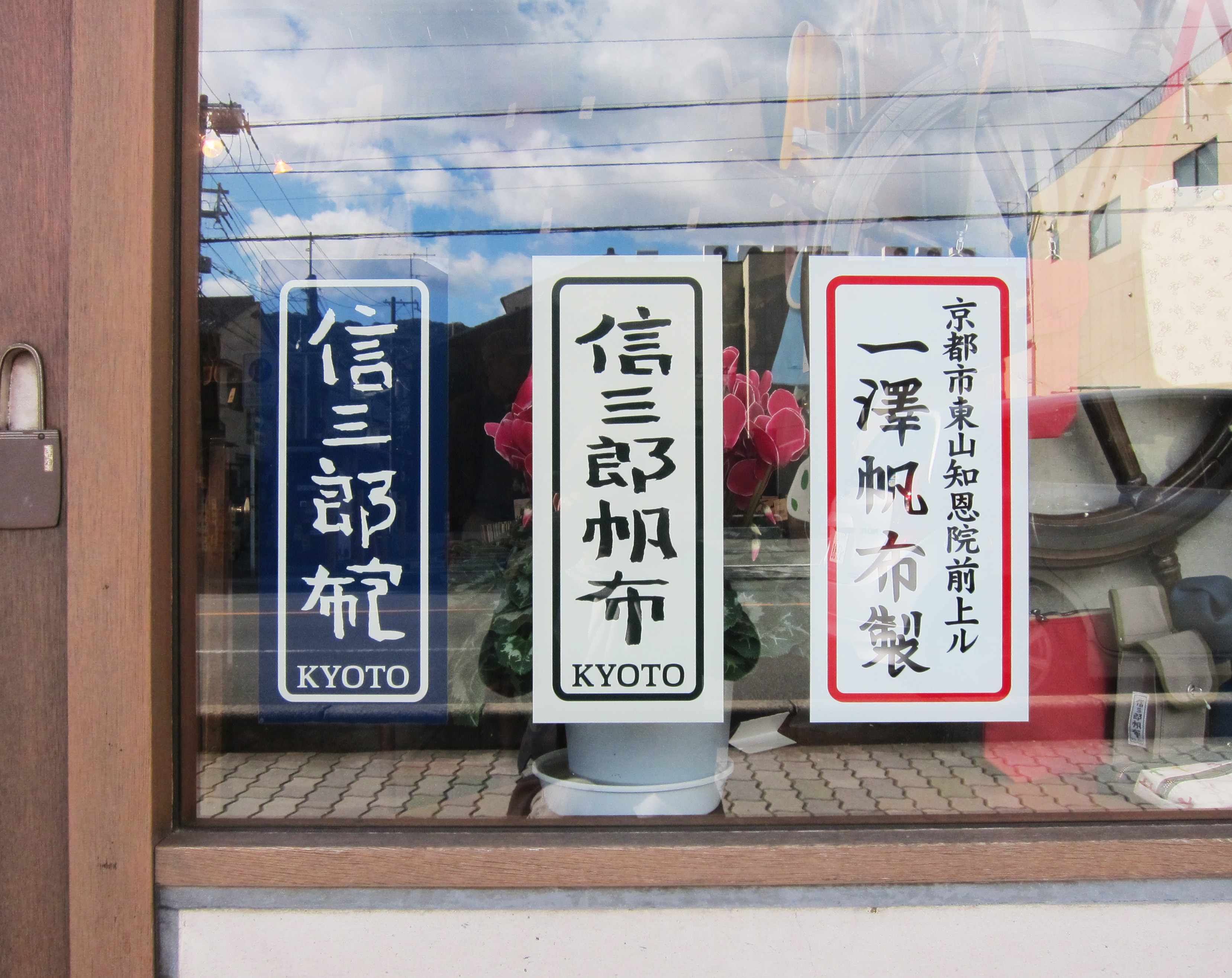 一澤帆布ショーケース